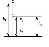 Збагачення за тертям